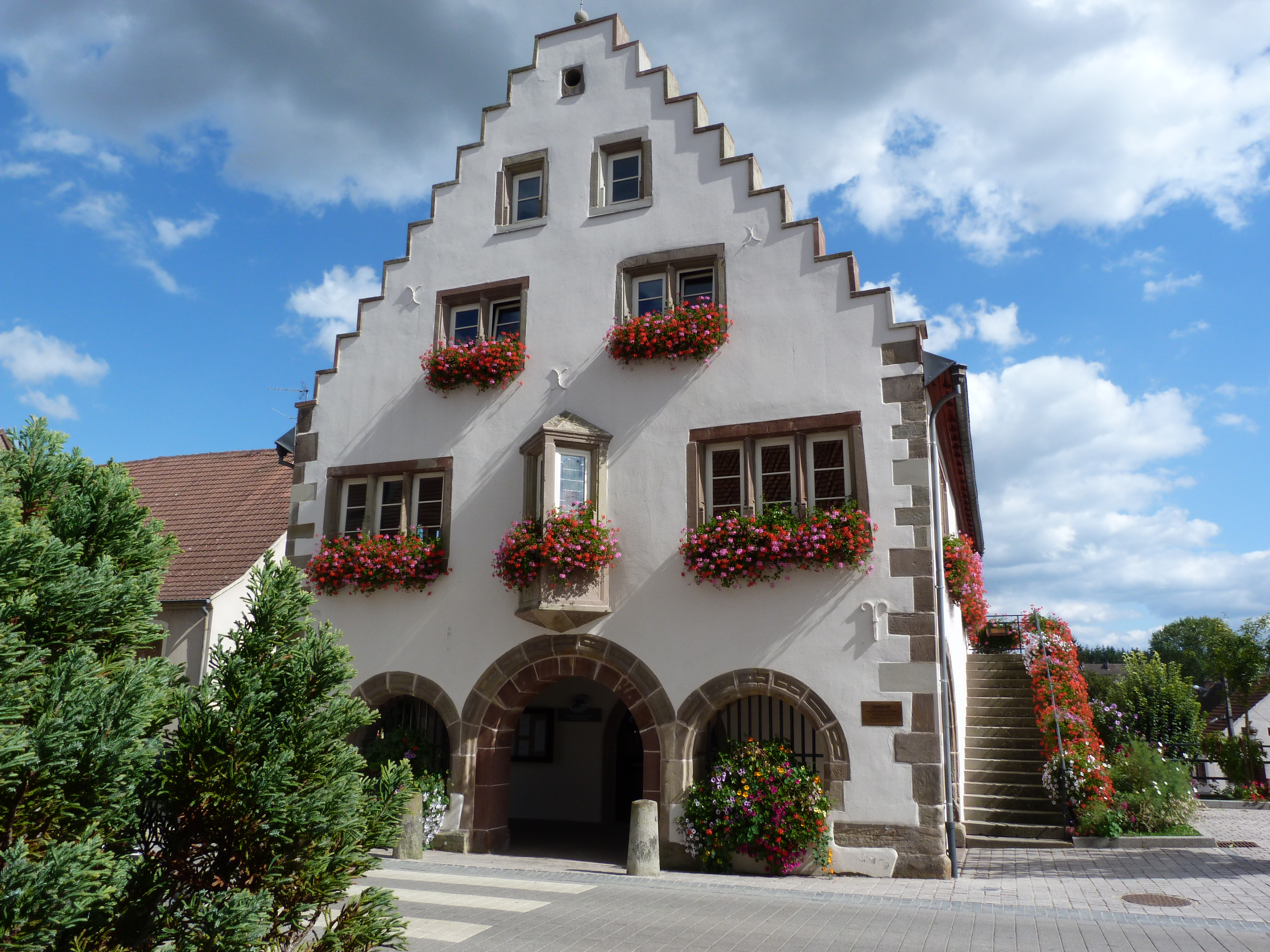 Hôtel de ville d'Oermingen, 29 rue de la Mairie (Inscrit, 1937)